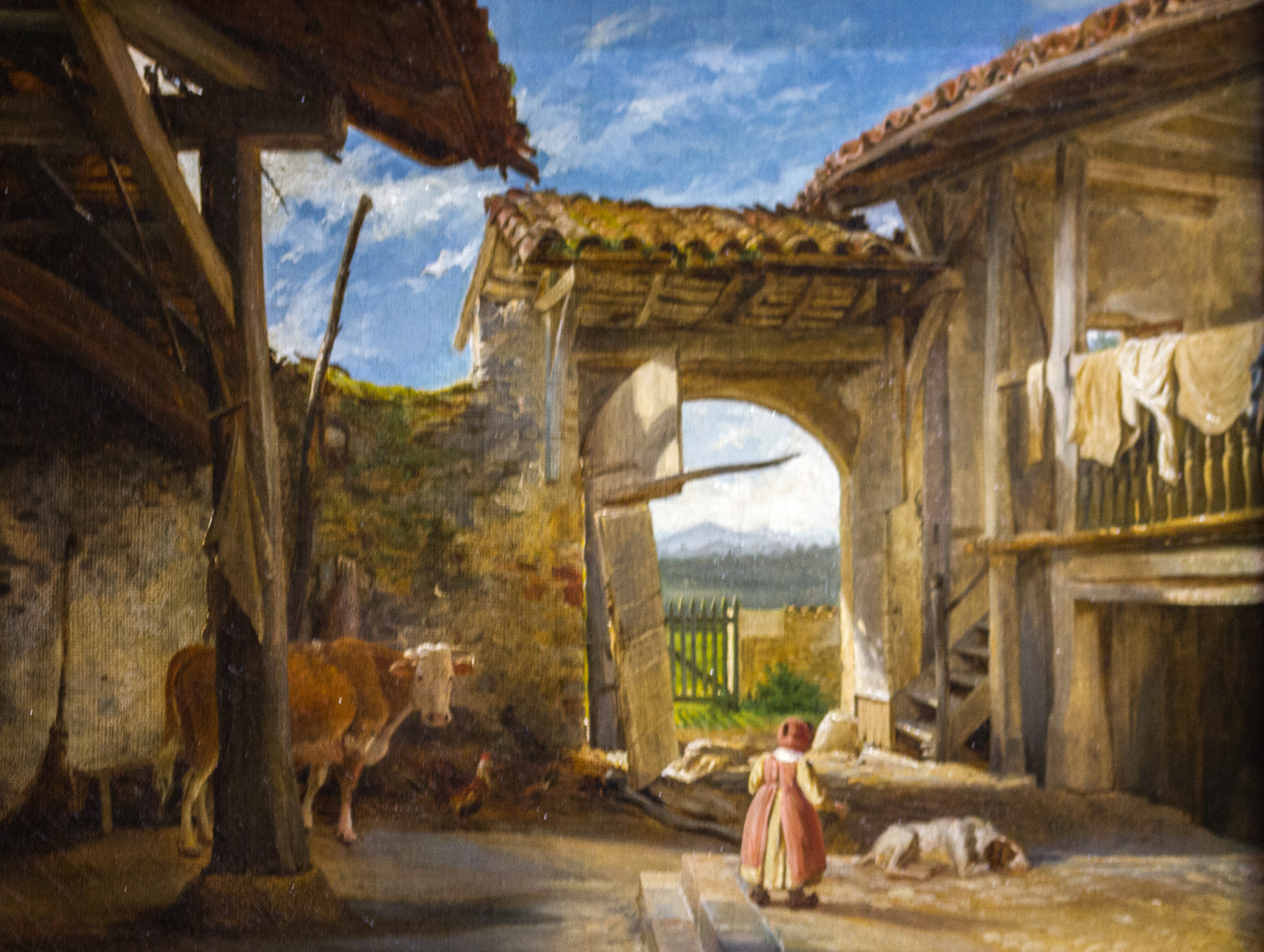 Cour de ferme, Auguste Flandrin, galerie Michel Descours